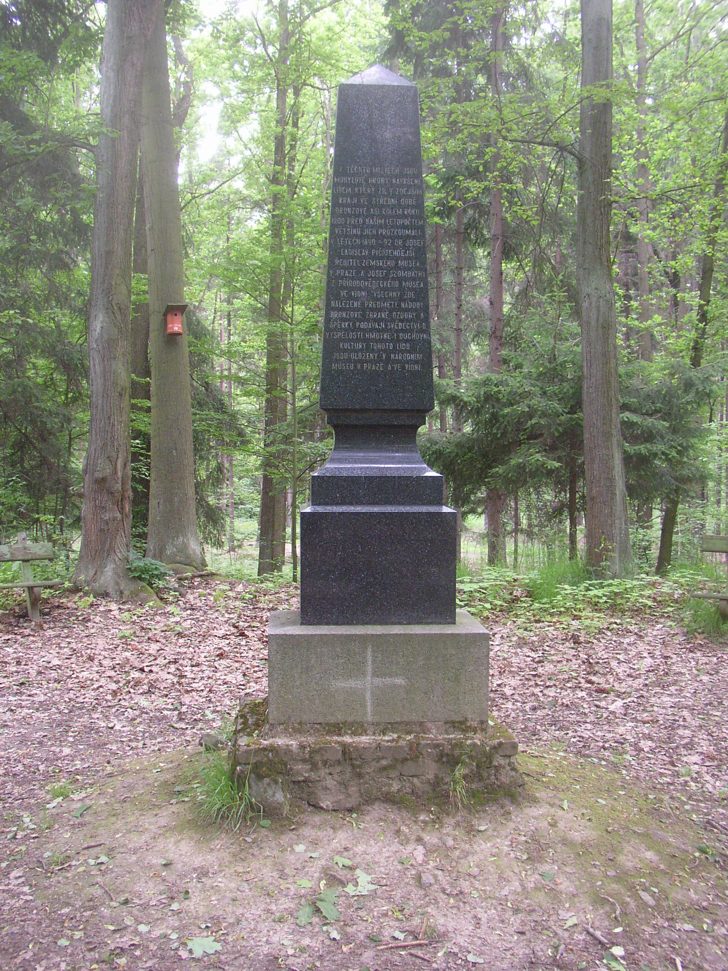 Pomník vztyčený roku 1953 na paměť archeologického výzkumu pravěkého mohylového pohřebiště v lese Hora u Velké Dobré na Kladensku. Text na pomníku: V TĚCHTO MÍSTECH JSOU MOHYLOVÉ HROBY NAVRŠENÉ LIDEM, KTERÝ ŽIL V ZDEJŠÍM KRAJI VE STŘEDNÍ DOBĚ BRONZOVÉ ASI KOLEM ROKU 1200 PŘED NAŠÍM LETOPOČTEM. VĚTŠINU JICH PROZKOUMALI V LETECH 1890 – 92 DR JOSEF LADISLAV PÍČ, TEHDEJŠÍ ŘEDITEL ZEMSKÉHO MUSEA V PRAZE A JOSEF SZOMBATHY Z PŘÍRODOVĚDECKÉHO MUSEA VE VÍDNI. VŠECHNY ZDE NALEZENÉ PŘEDMĚTY, NÁDOBY, BRONZOVÉ ZBRANĚ, OZDOBY A ŠPERKY, PODÁVAJÍ SVĚDECTVÍ O VYSPĚLOSTI HMOTNÉ I DUCHOVNÍ KULTURY TOHOTO LIDU. JSOU ULOŽENY V NÁRODNÍM MUSEU V PRAZE A VE VÍDNI.